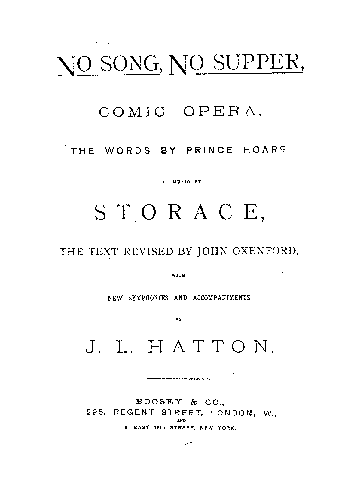 Stephen Storace No Song, No Supper piano reduction John Liptrot Hatton vor 1886